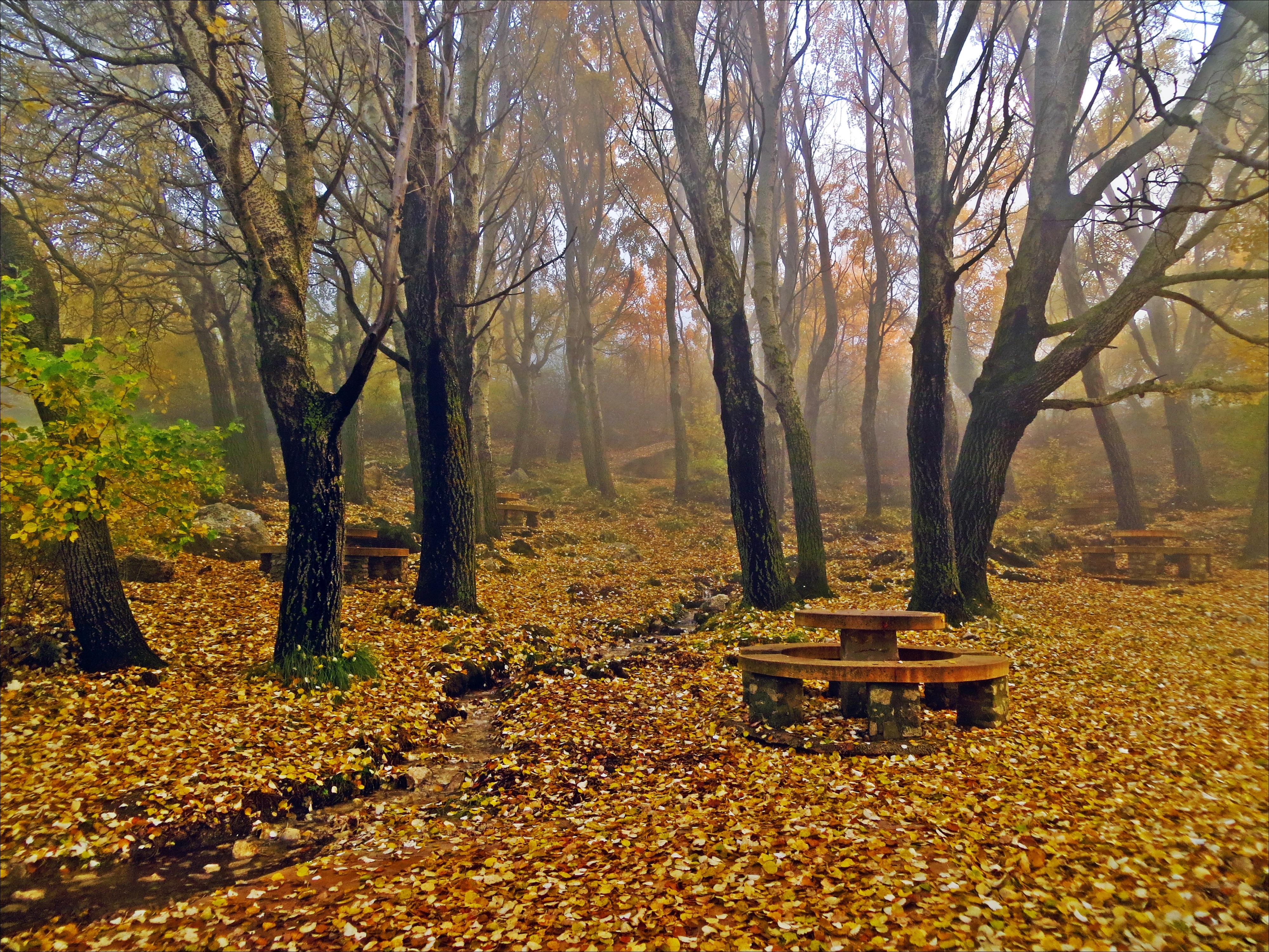 Colores otoñales en la Font de Partagat